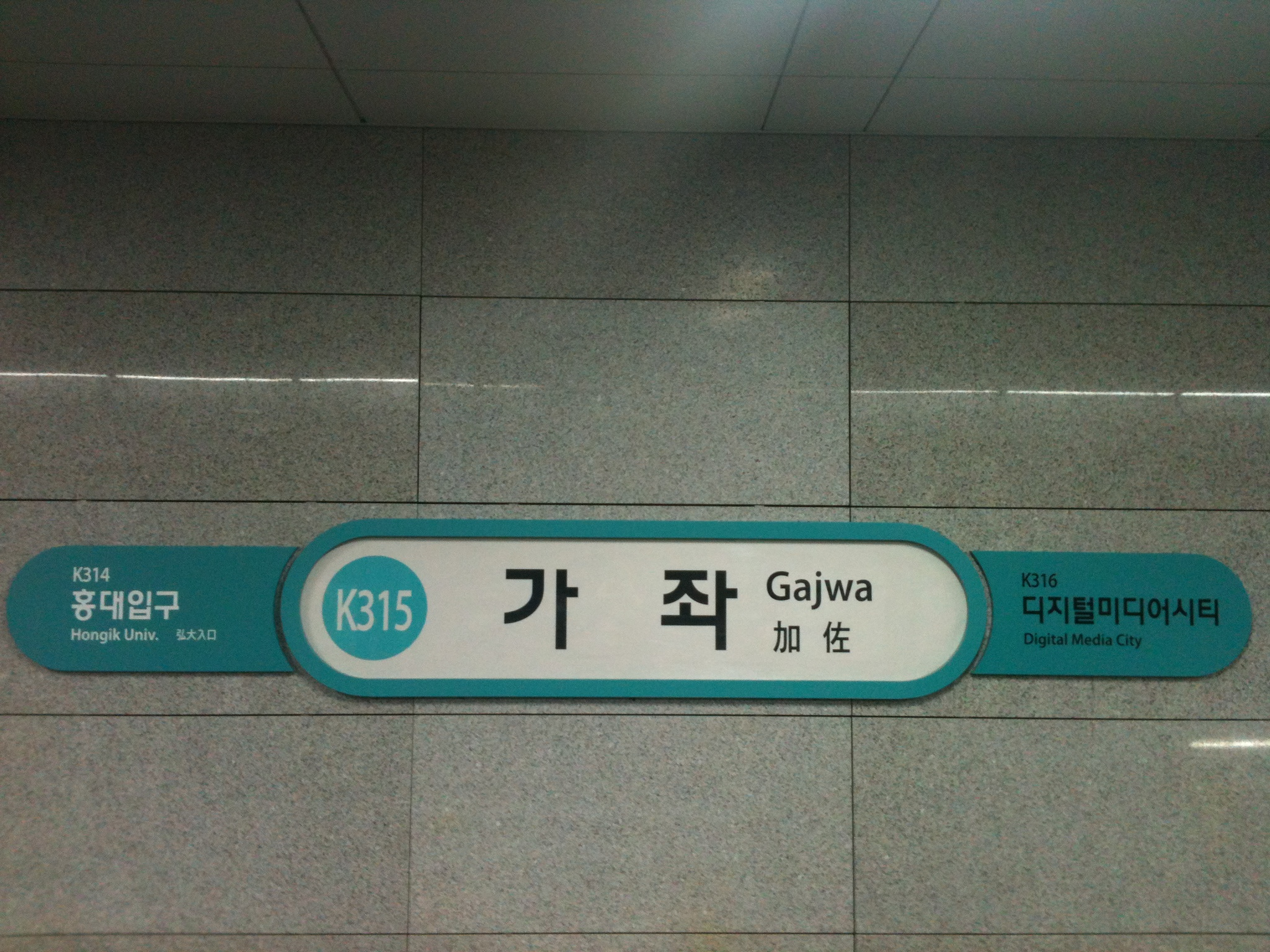 용산선(수도권 전철 경의선) 가좌역 지하 승강장 역명판.